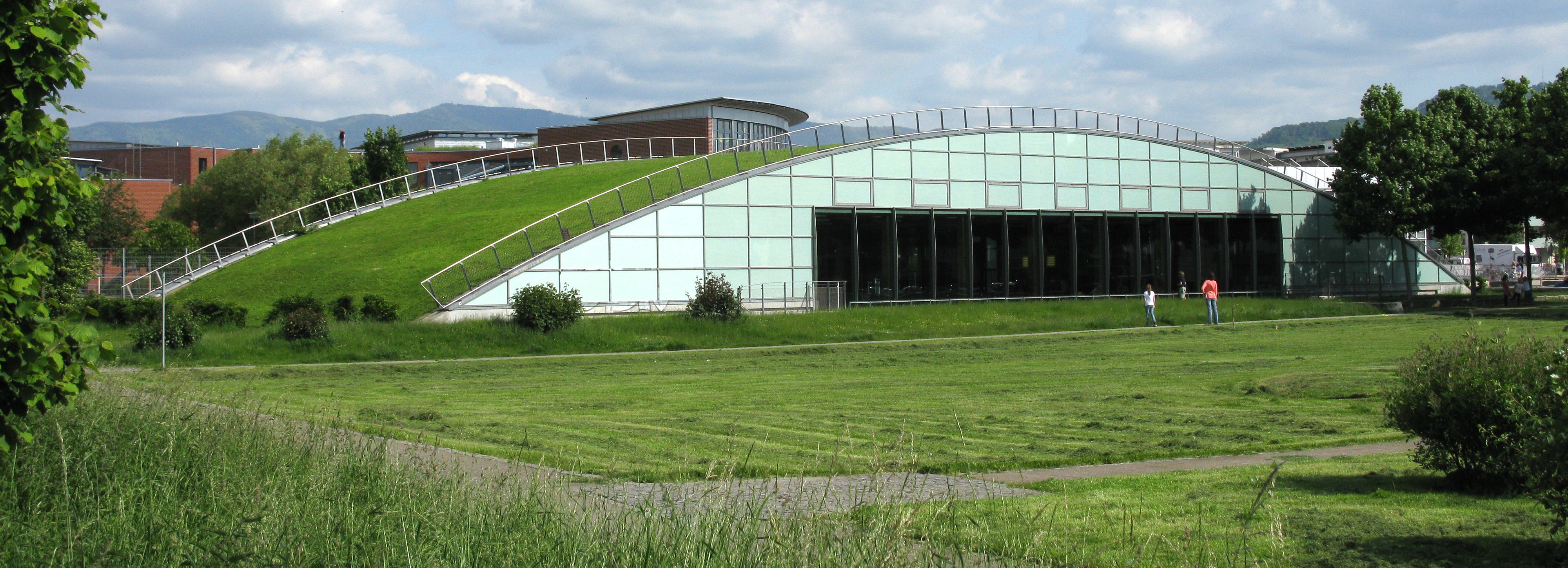 Grünkeil Rieselfeld mit begrünter Sporthalle der Clara-Grunwald-Schule